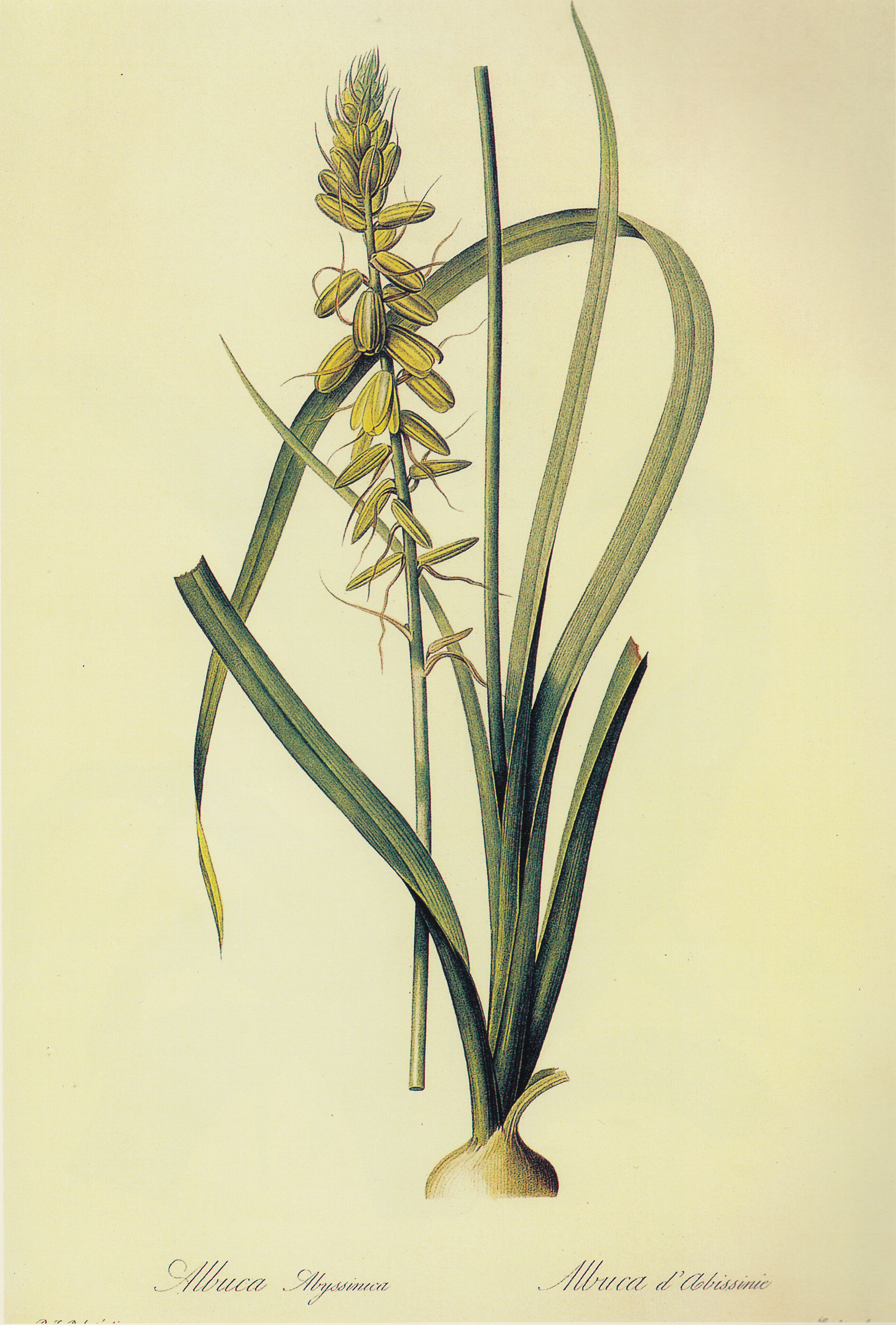 埃塞俄比亚灯笼花。原产于非洲。